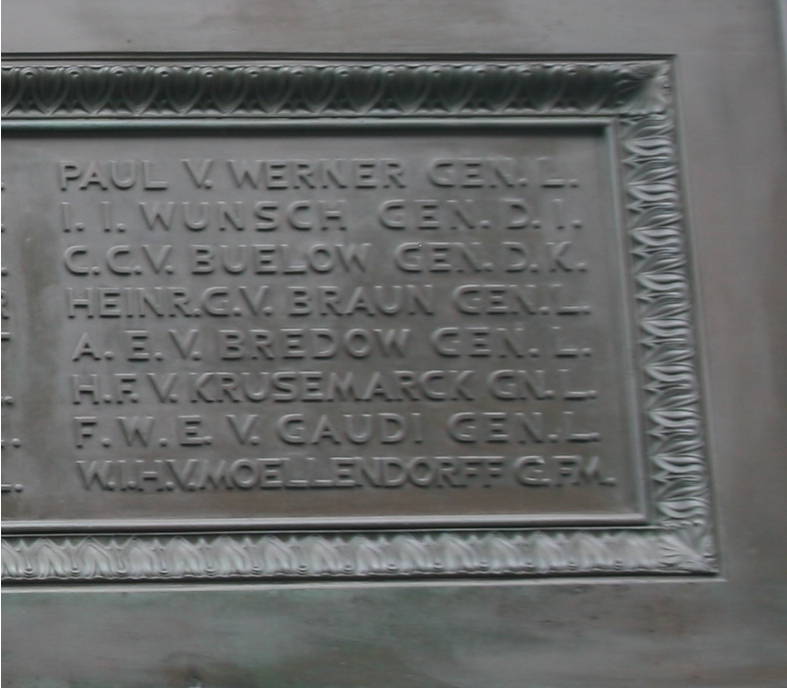 Reiterstandbild - Friedrich der Große - Südansicht ( Details ) unten - Namenstafel - Rechts PAUL V. WERNER GEN.L. --------- Paul von Werner I.I. WUNSCH GEN.D.I. ----- Johann Jakob von Wunsch C.C. V. BUELOW GEN.D.K. ---------- Christoph Karl von Bülow HEINR.C. V. BRAUN GEN.L. --- Heinrich Gottlob von Braun A.E. V. BREDOW GEN.L. -------------- Asmus Ehrenreich von Bredow H.F. V. KRUSEMARCK GEN.L. --- Hans Friedrich von Krusemarck F.W.E. V. GAUDI GEN.L. ------------- Friedrich Wilhelm von Gaudi W.I.H. V. MOELLENDORFF G.F.M. ----------- Wichard von Möllendorff (General) Quelle der Links : wiki Berlin - Unter den Linden ( Mittelpromenade ) Baudenkmal ( LDA ) Landesdenkmalamt - Berlin Dok Nr. 09060118 LDA Info wiki Reiterstandbild Friedrichs des Großen